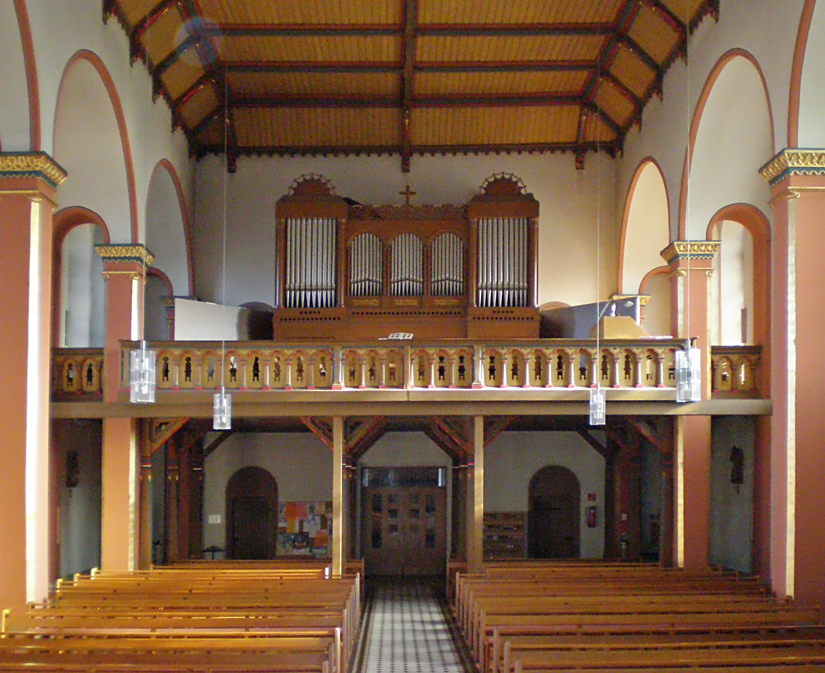 Orgel in der Kath. Kirche in Rohrbach (Saar)